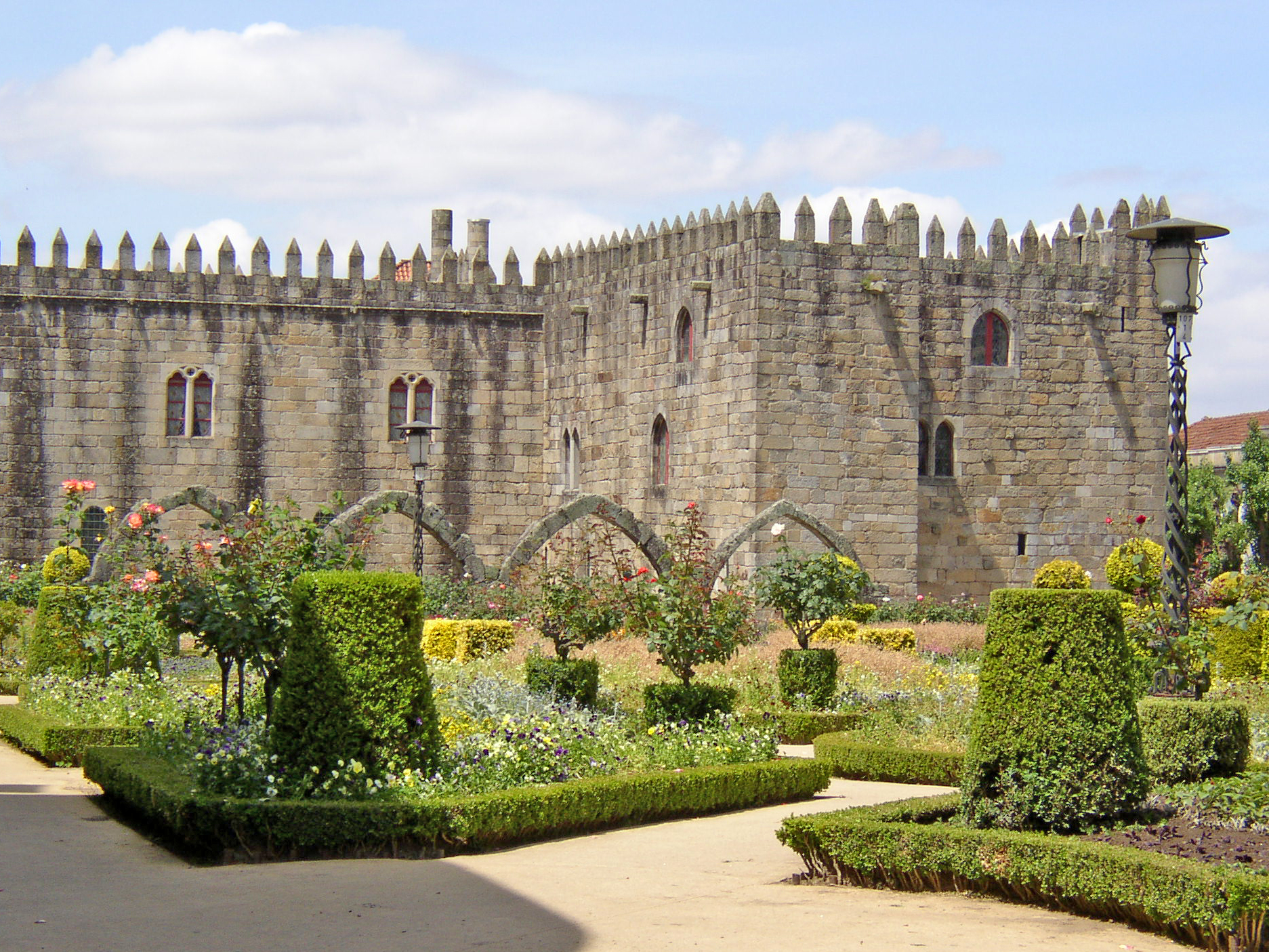 Paço Episcopal Bracarense ou Antigo Paço Episcopal Bracarense, Paço Arquiepiscopal This file was uploaded for Wiki Loves Monuments in Portugal with the unique identifier 73930.